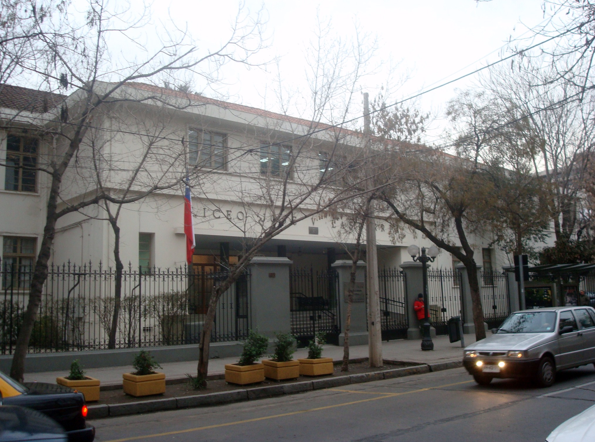 Liceo José Victorino Lastarria, Providencia, Santiago de Chile